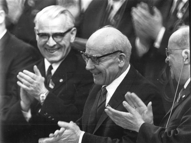 Zentralbild Gahlbeck 19.4.1967 th-ki. VII. Parteitag der SED - 19.4.1967. Beifall für die Diskussionsrede am 3. Sitzungstag - V.l.n.r.: Willi Stoph, Mitglied des Politbüros des ZK der SED, Wladyslaw Gomulka, Erster Sekretär des ZK der PVAP, Friedrich Ebert, Mitglied des Politbüros des ZK der SED.